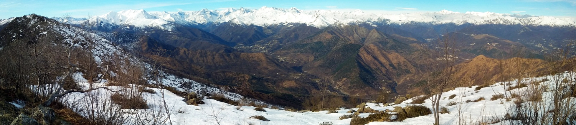 Panorama dal Monte Druina (Alpi Graie): panorama verso ovest